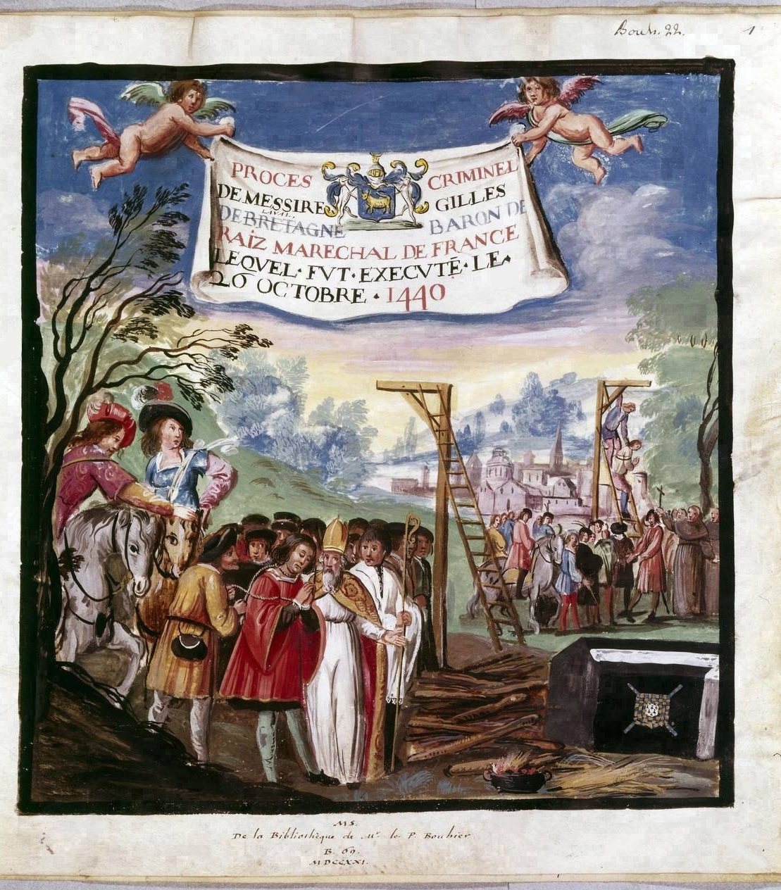 Exécution de Gilles de Rais (gibet et bûcher). Deux angelots déploient une banderole figurant les armes de Jean Bouhier, président à mortier au parlement de Dijon (d'azur au chevron d'or, accompagné en chef de deux croissants d'argent, et en pointe d'une tête de bœuf d'or). La miniature est raturée, l'indication erronée « Gilles de Bretagne » a été biffée dans la banderole et remplacée par « Gilles de Laval ». Manuscrit à peinture, Paris, Bibliothèque nationale de France (BnF).